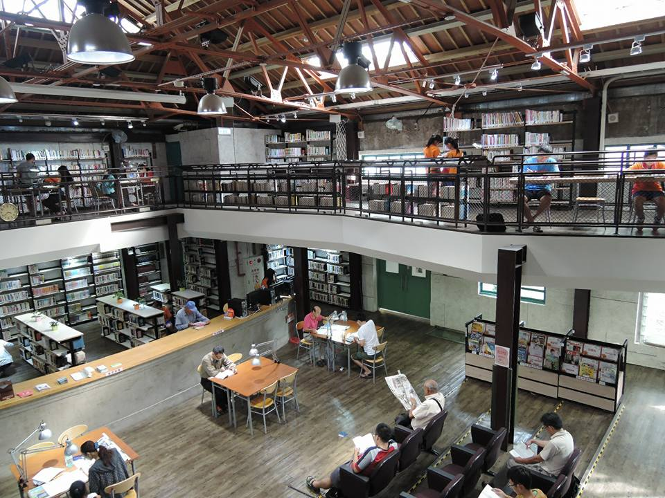 桃園市八德區大湳圖書館